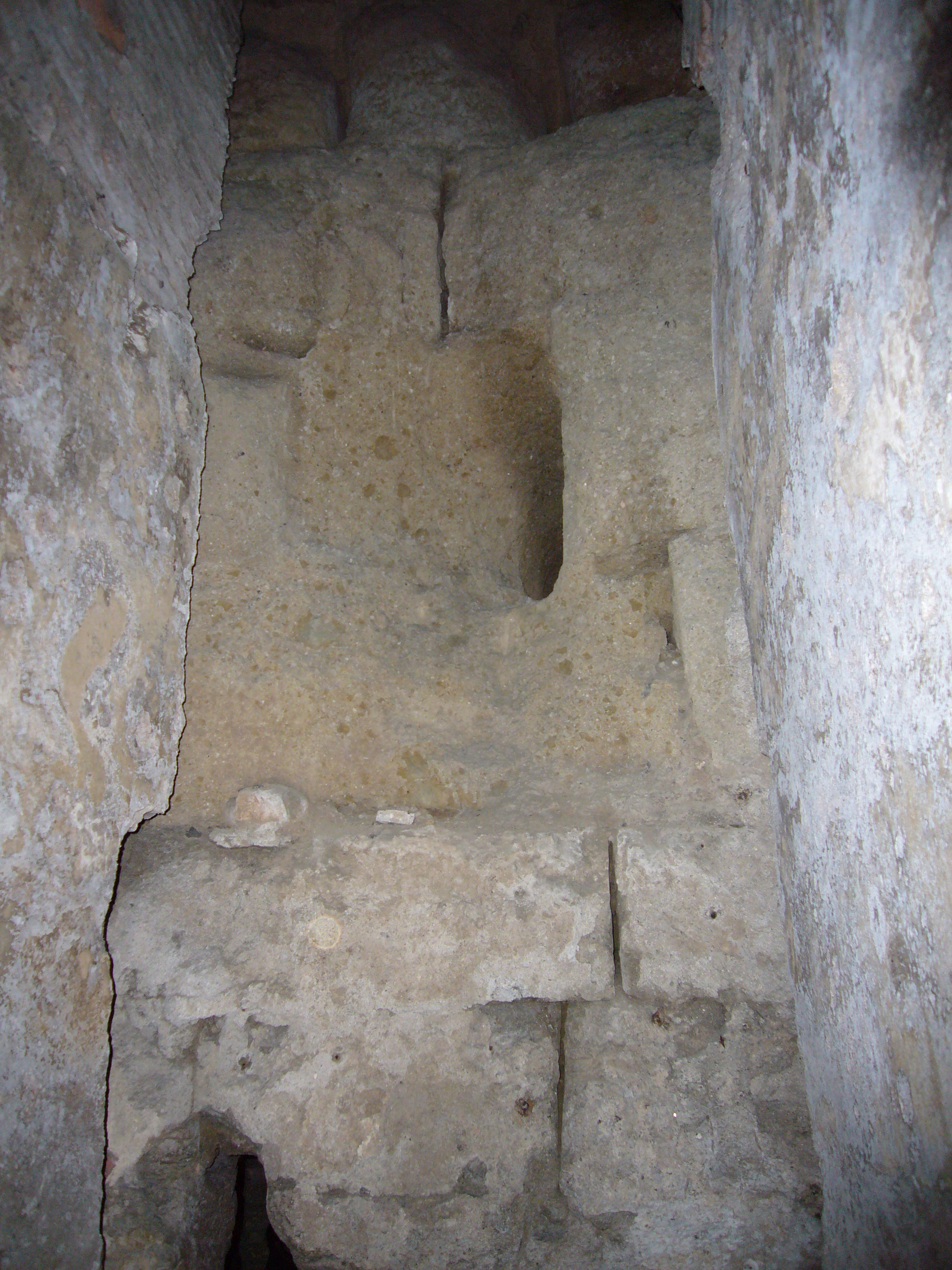 Roma, scavi di santa Sabina: mura serviane inglobate